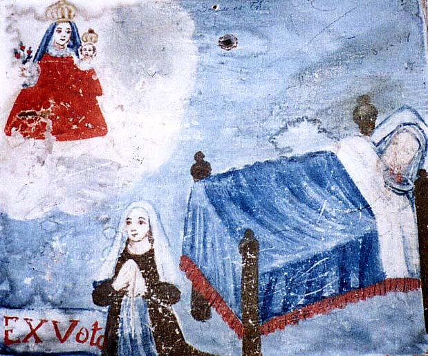 Ex-voto dédié à la Vierge Ermitage de Font-Romeu Jean Tosti 2005